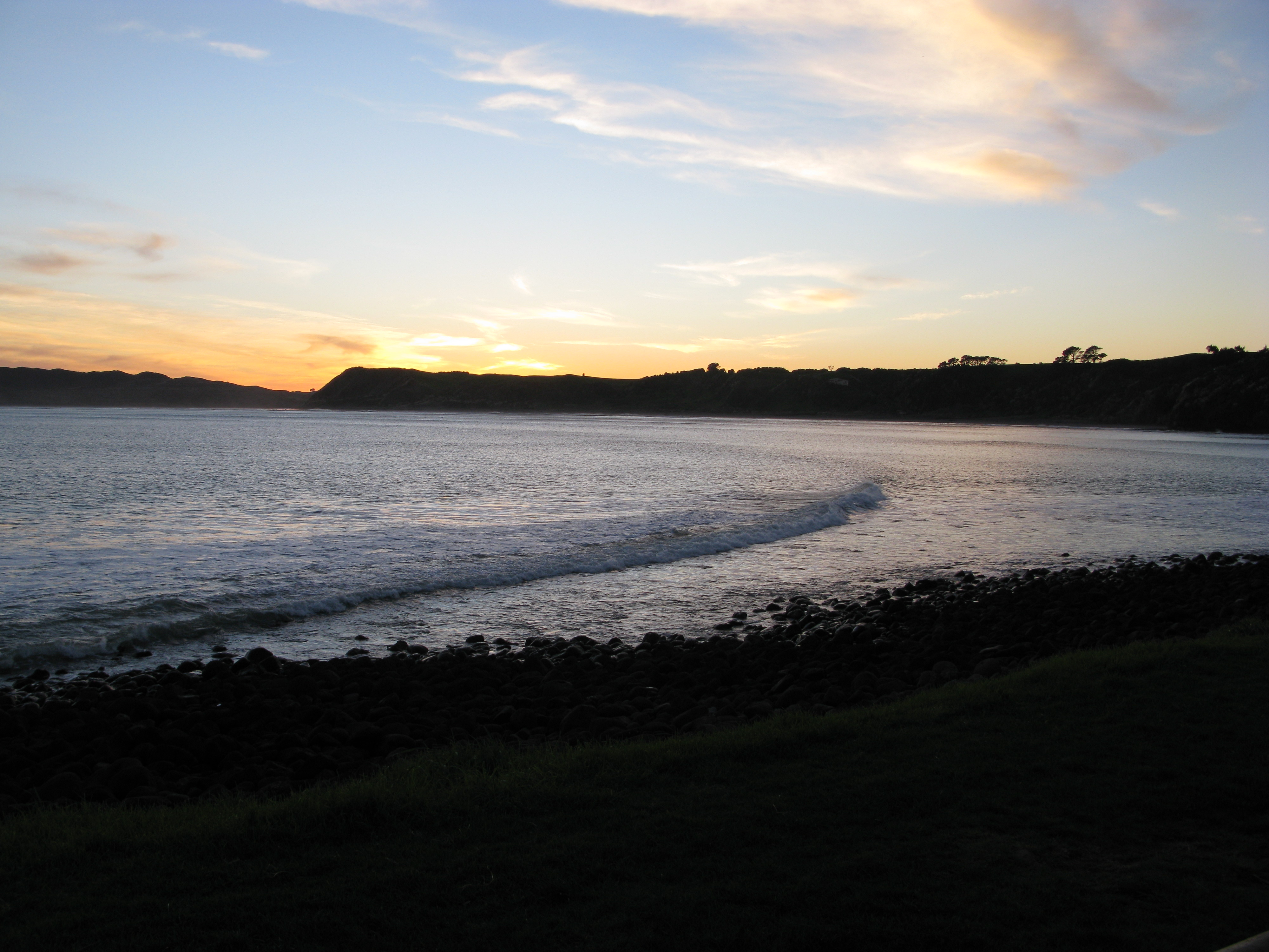 Manu Bay, à Raglan (Nouvelle-Zélande)